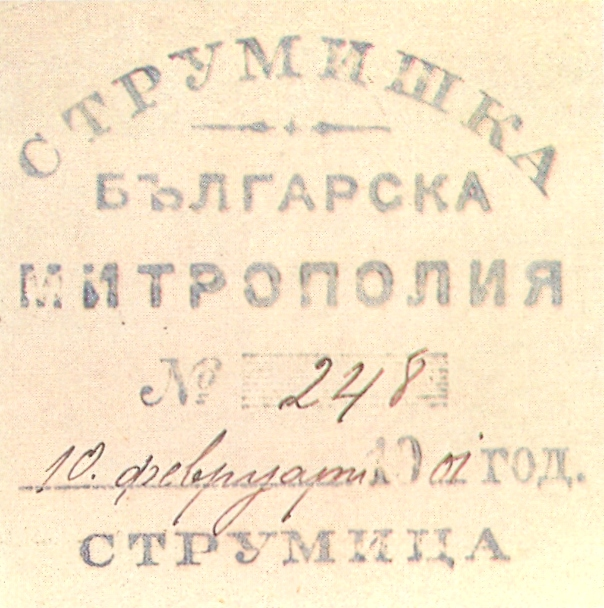 Глава на документ на Българската струмишка митрополия.